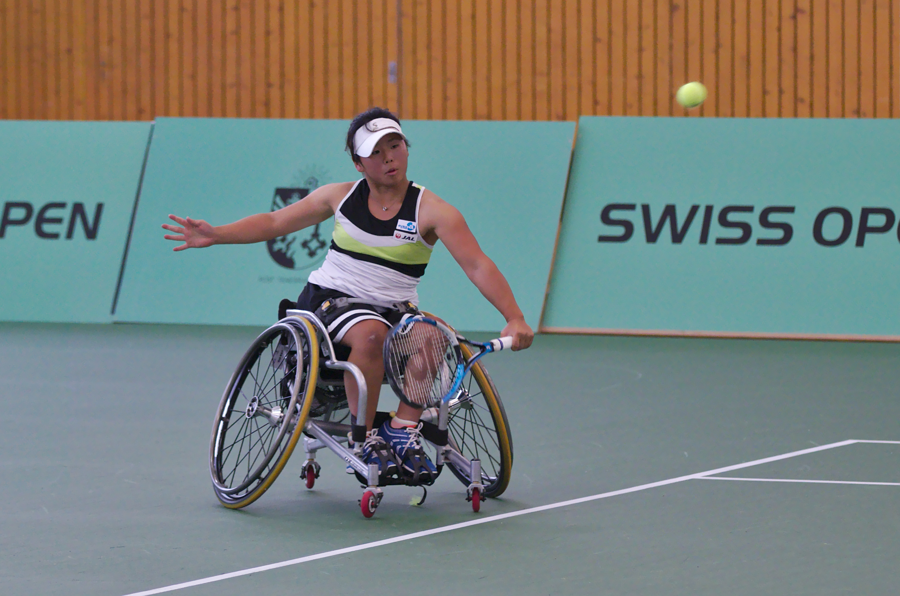 Swiss Open Geneva - 20140712 - Semi final Women - Y. Kamiji vs K. Montjane